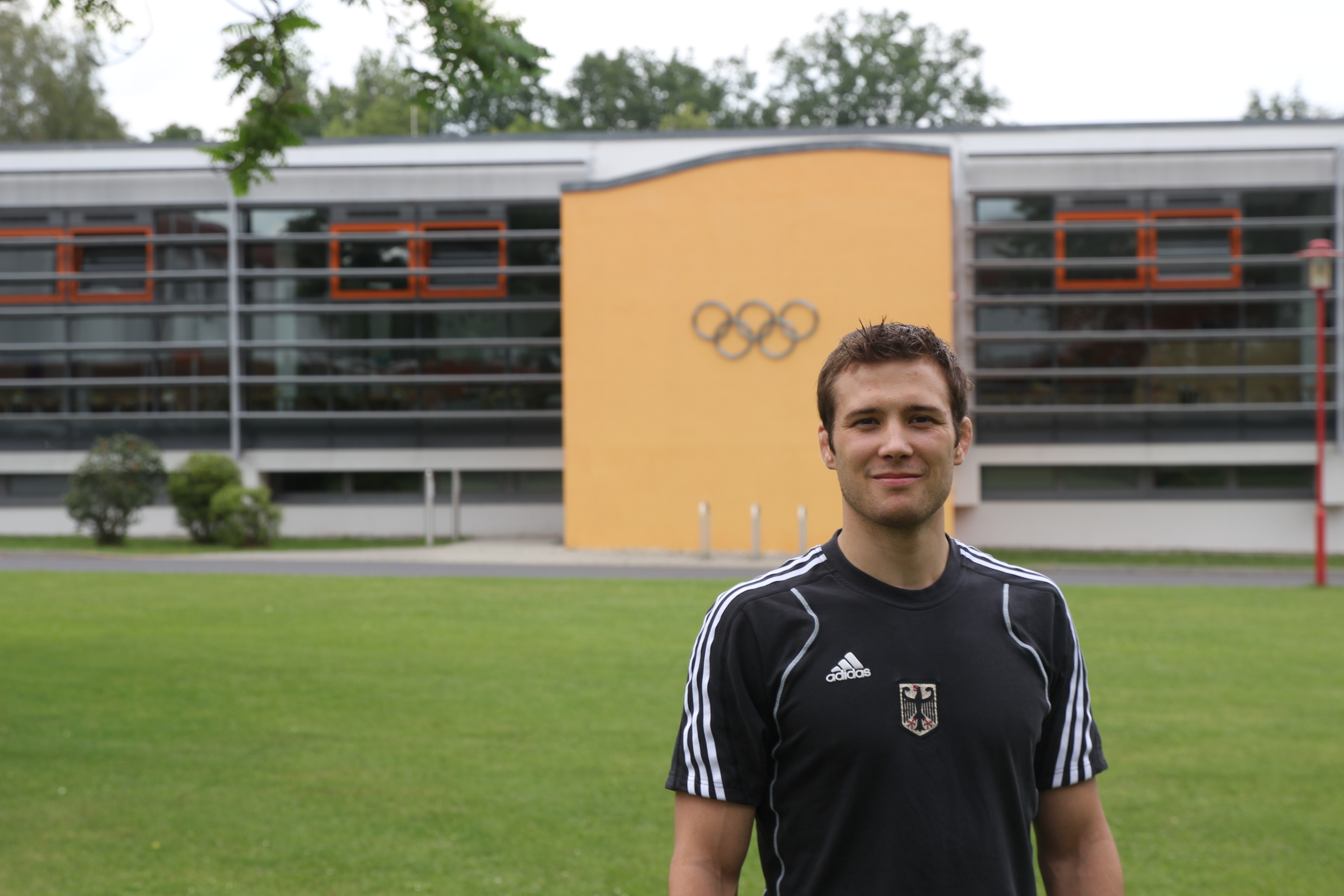 Christophe Lambert im Abschlusstrainingslager der Judo Nationalmannschaft im Bundesleistungszentrum Kienbaum / Berlin für die Olympischen Spiele in London 2012